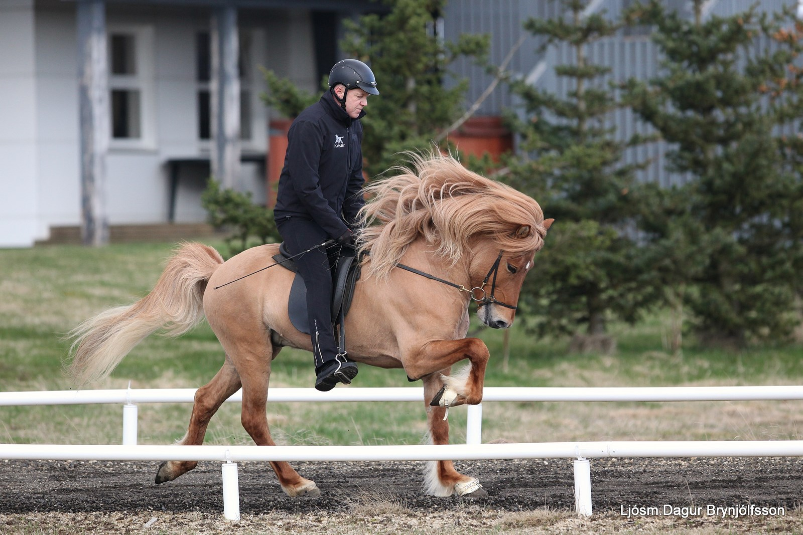 Ómur frá Kvistum